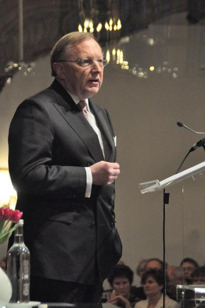 Installatie Tjibbe Joustra als voorzitter van de Onderzoeksraad voor Veiligheid